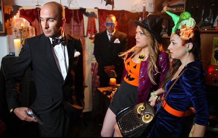 דנה זקס, נלי תגר ואסי כהן בסדרת הטלוויזיה המכשפות משינקין